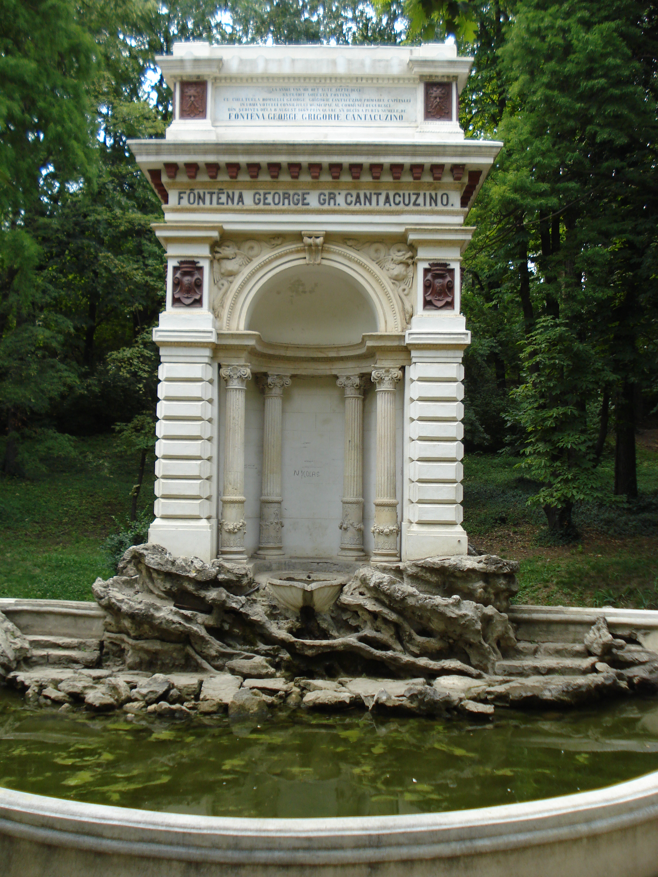 Fântâna Cantacuzino, Parcul Carol, București